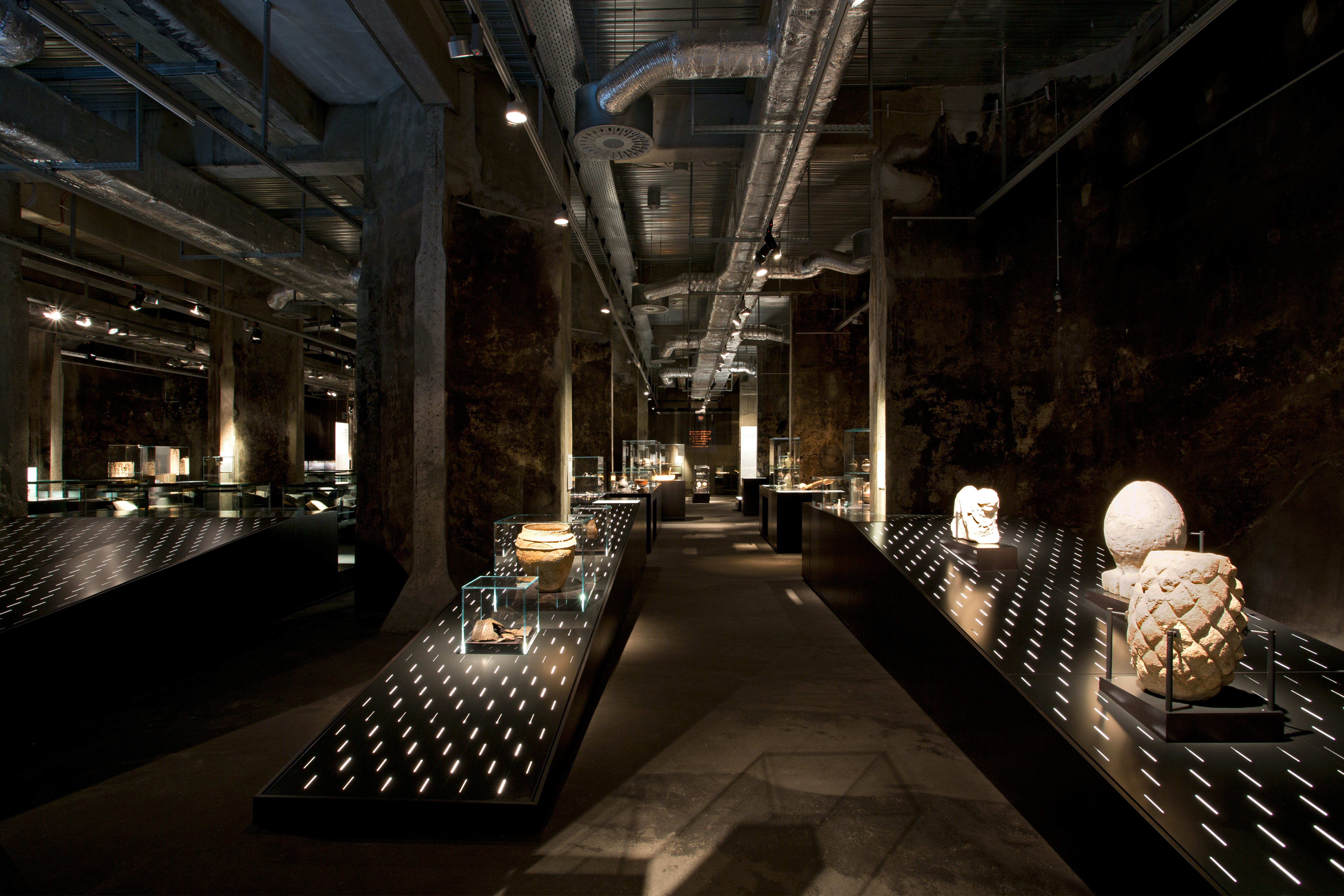 Sonderausstellung des Ruhr Museums "Werdendes Ruhrgebiet. Spätantike und Frühmittelalter an Rhein und Ruhr"